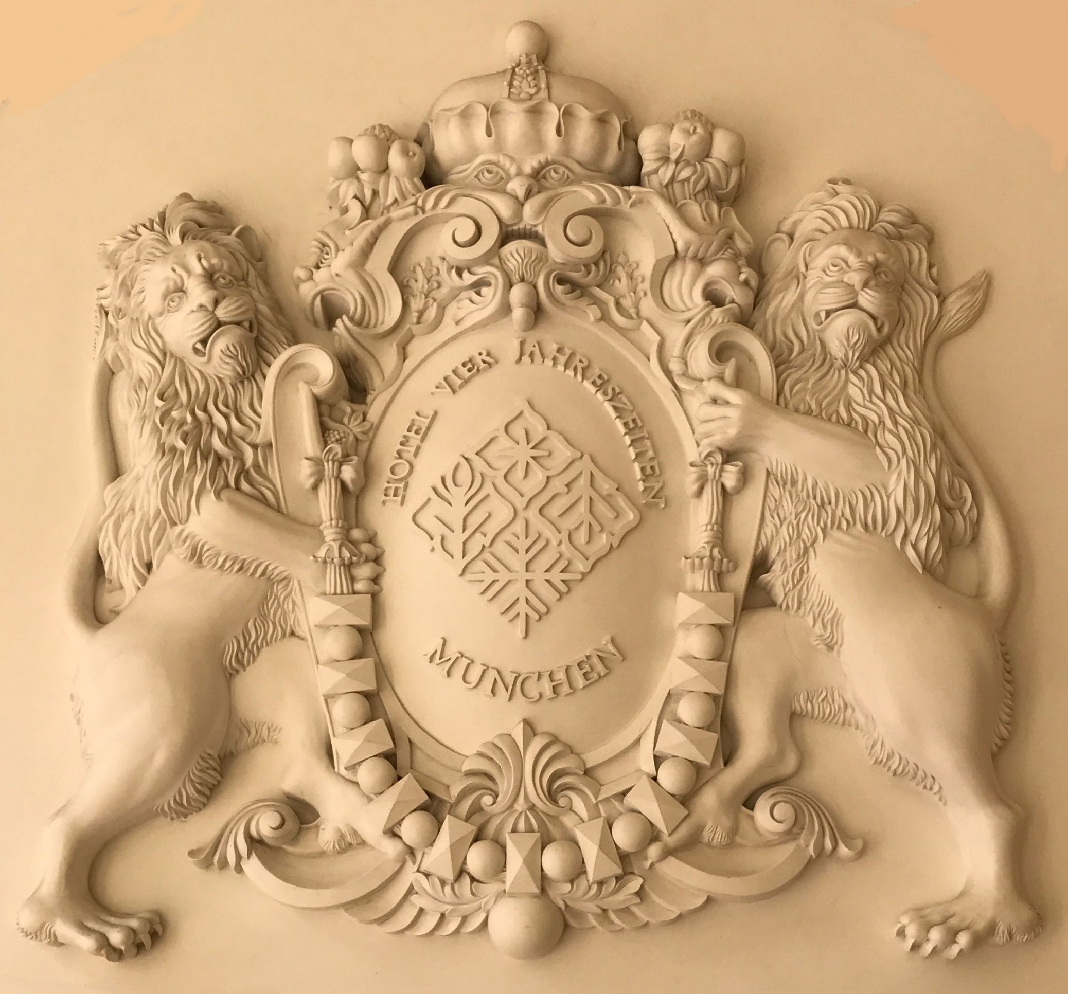 Wappen des Hotels Vier Jahreszeiten München